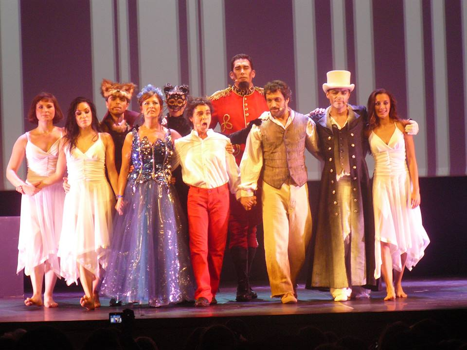 La troupe des chanteurs de Pinocchio